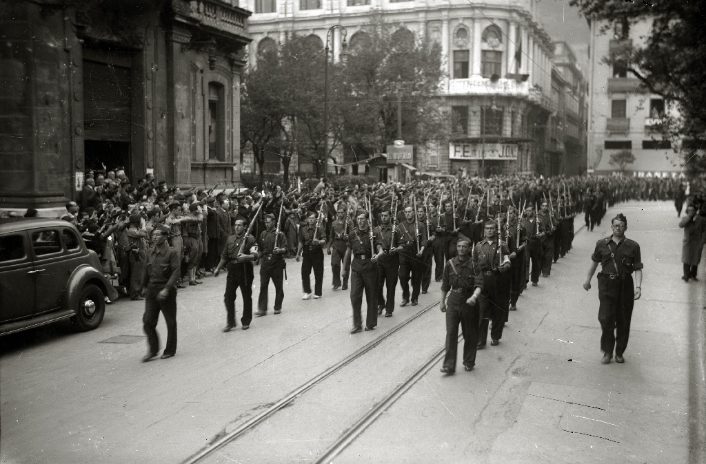 Título original: Desfile militar de soldados del bando nacional (1/2) Localización: San Sebastián (Guipúzcoa)